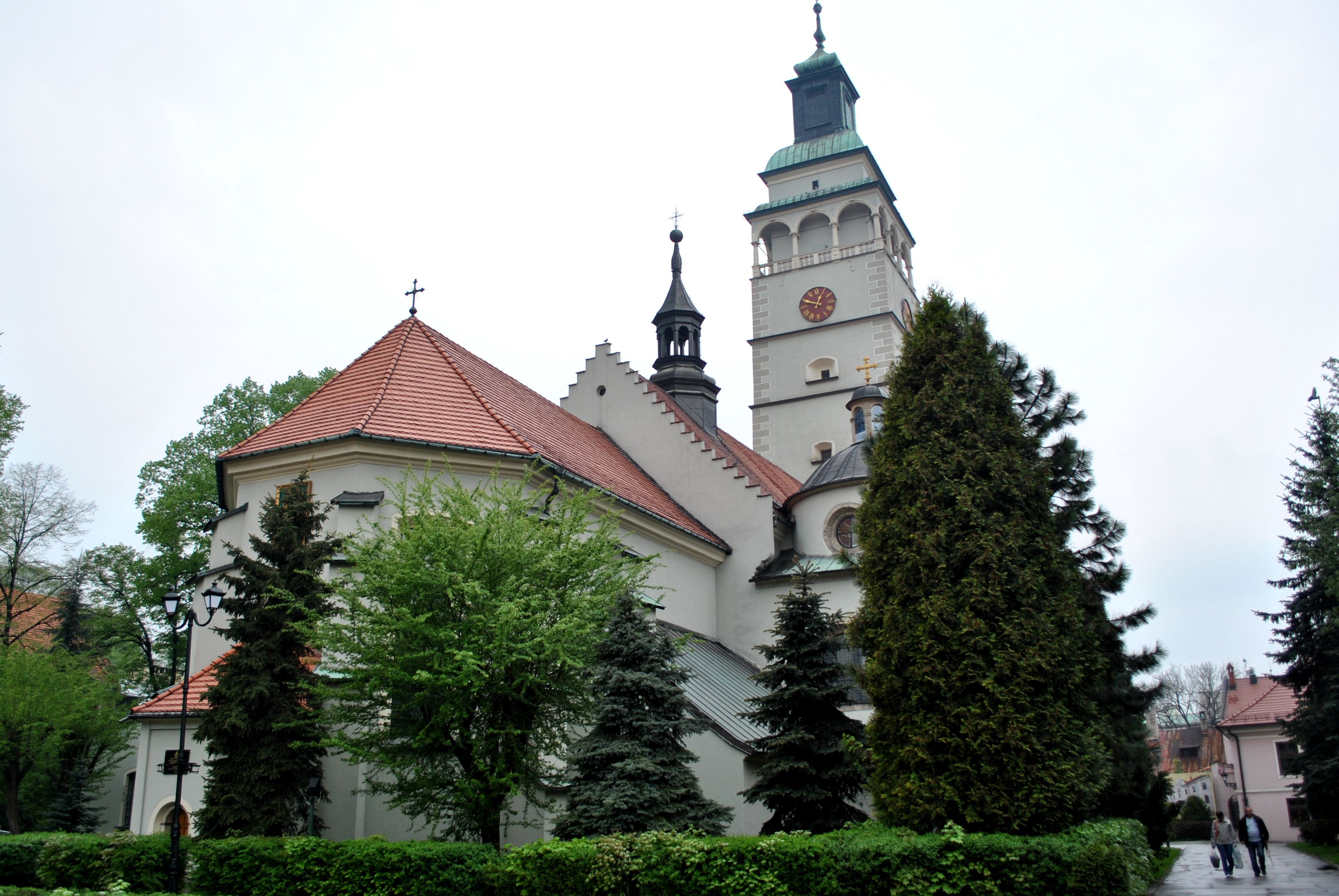 Kościół p.w. Narodzenia NMP w Żywcu. 10.1987.